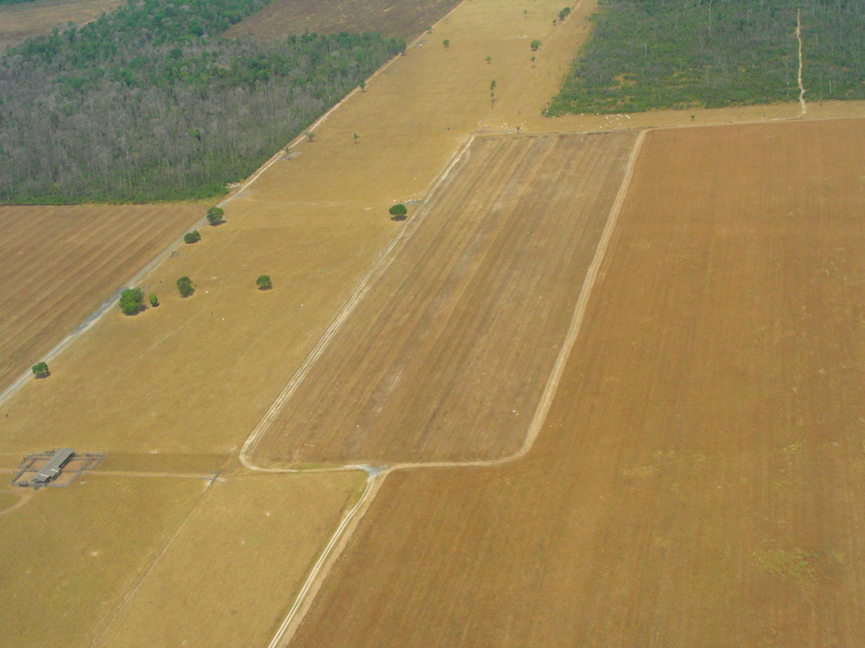 Mato Grosso - Área de plantio no noroeste do estado, próximo à região do Parque Indígena do Xingu